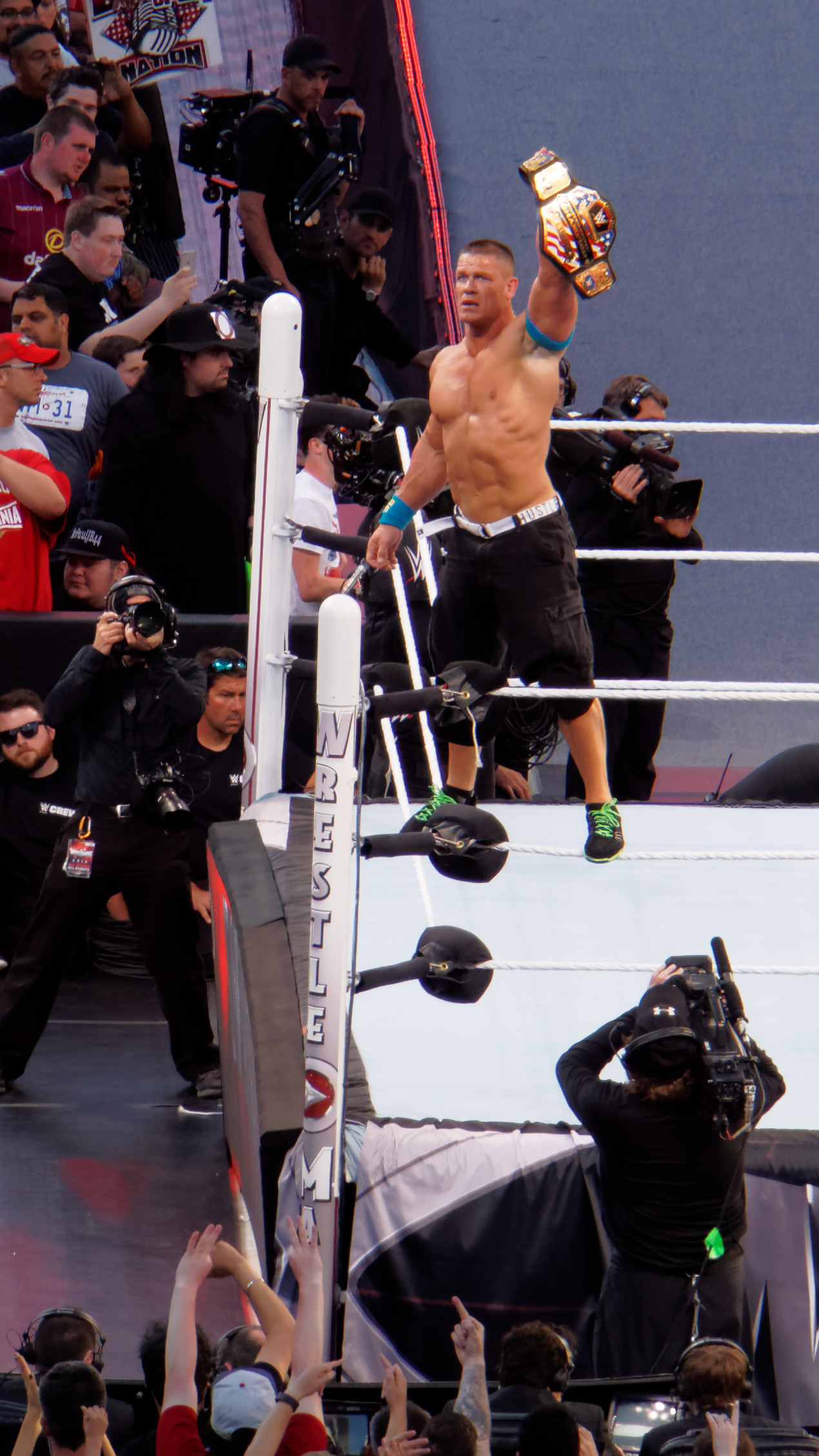 2015-03-29_18-28-18_ILCE-6000_8859_DxO